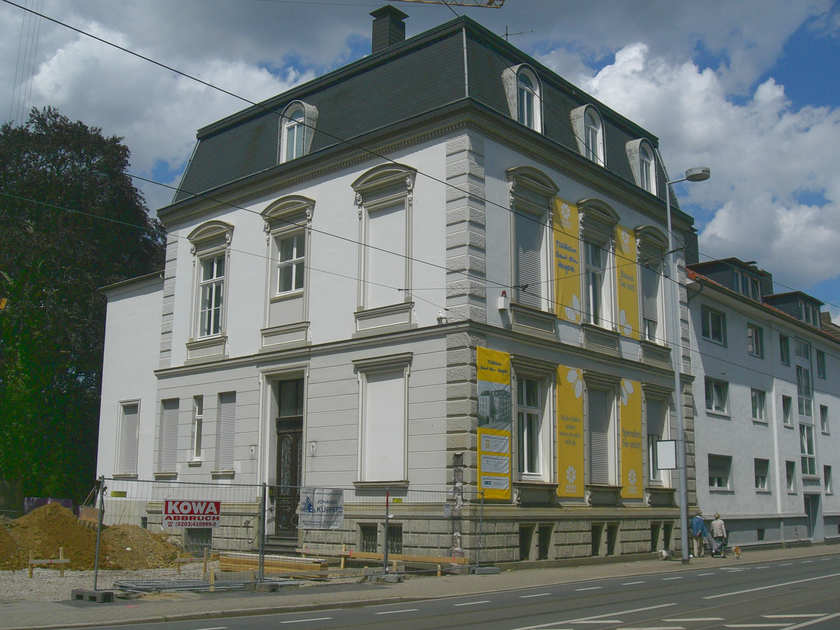 Villa Eugen Coupienne - FStr40